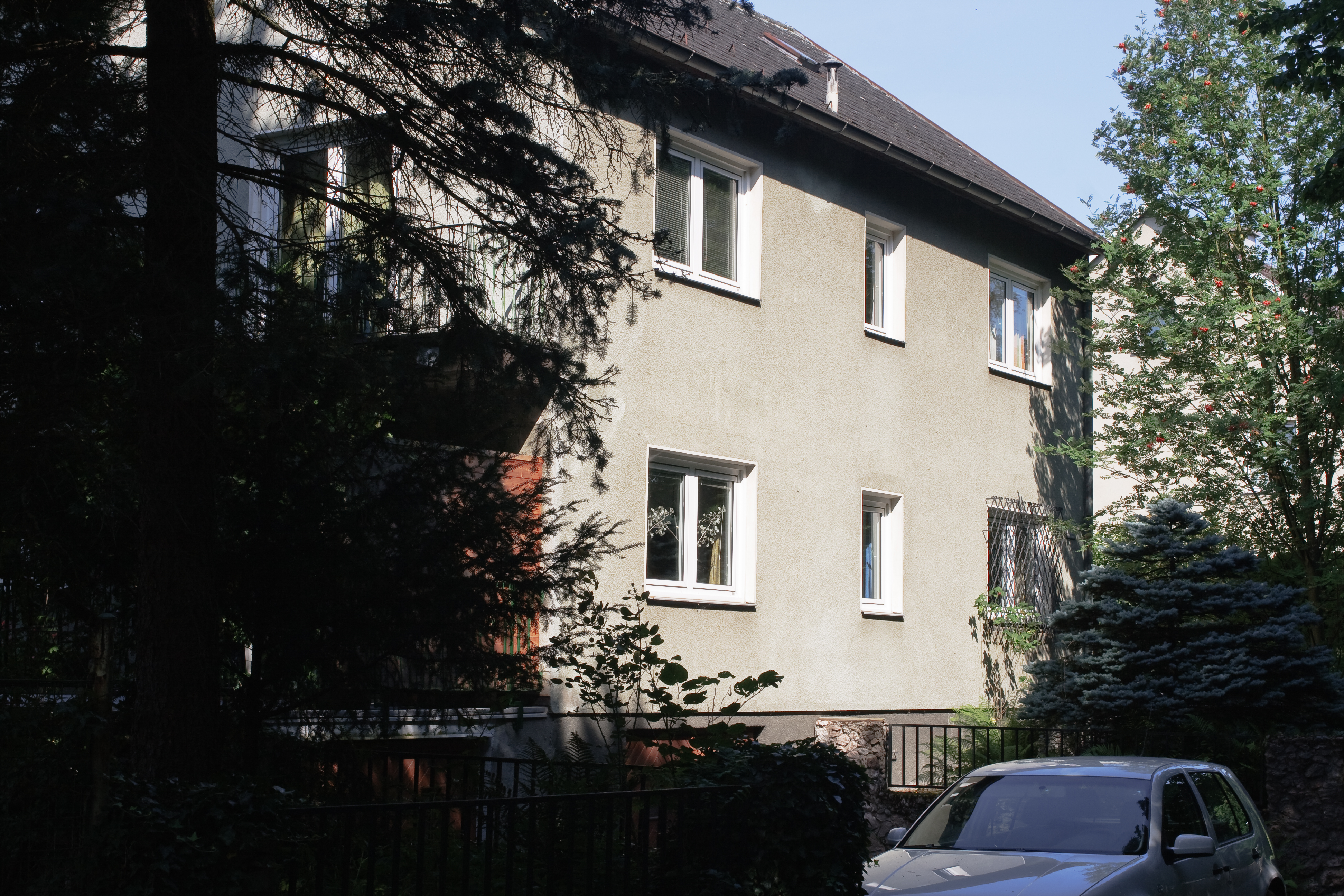 Das Haus Taborweg 19 in Steyr. Hier wohnte die Schriftstellerin Marlen Haushofer von 1960 bis 1969[1]